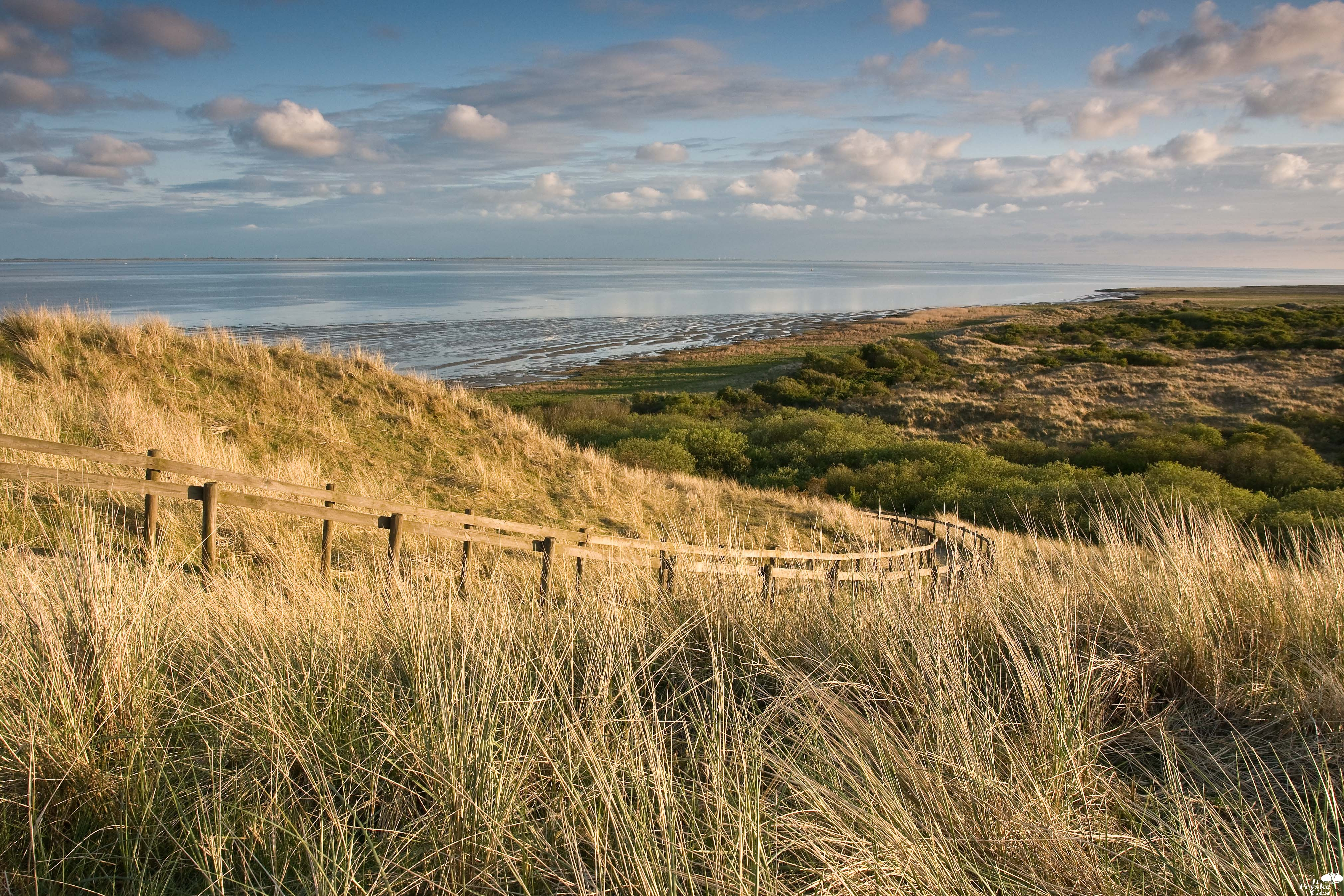 Fan Gea-bylden, beskikber steld foar de Wikipedy troch fotograaf Albert Wester